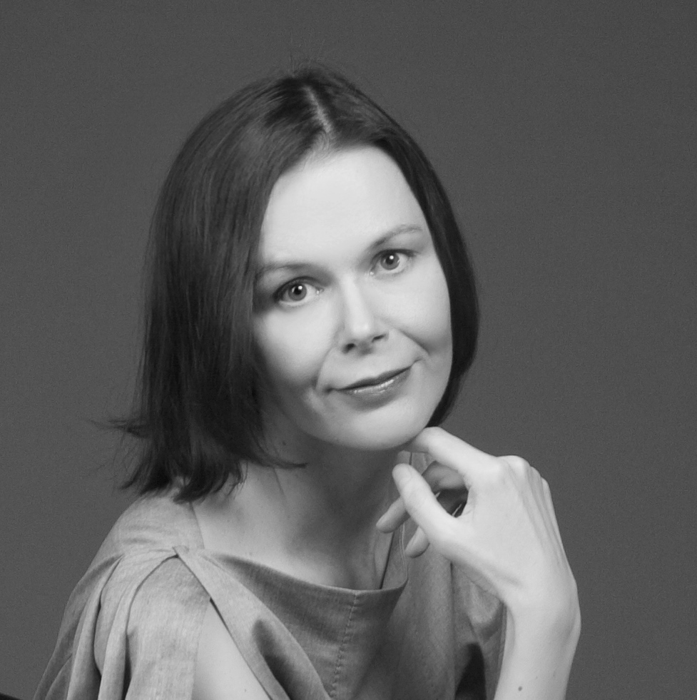 M.Paimre